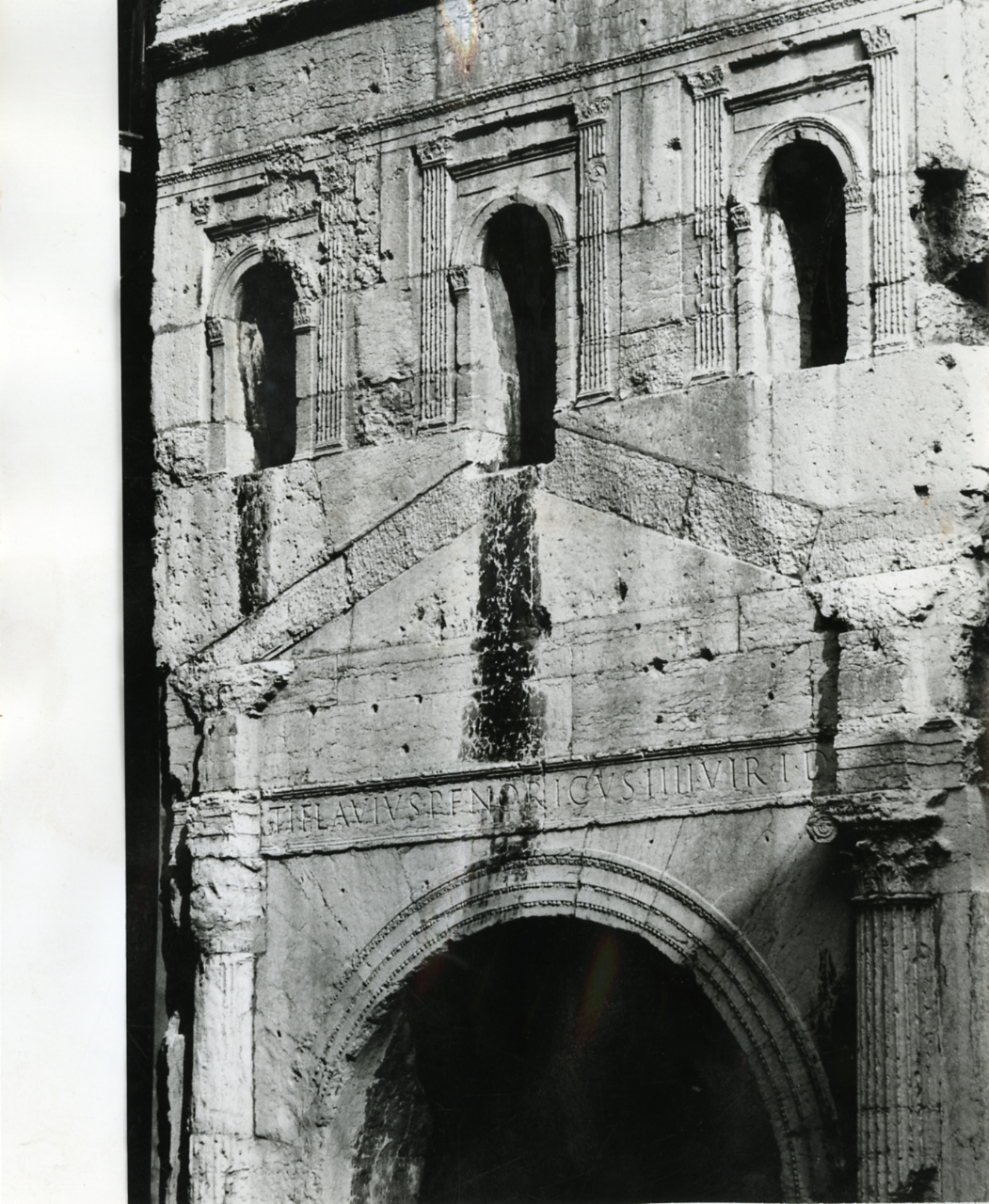 Verona. Porta dei Leoni e particolari. Servizio fotografico : Verona, 1972 / Paolo Monti. - Stampe: 2 : Positivo b/n, gelatina bromuro d'argento/ carta, 24x30. - ((Al verso delle stampe manoscritti i numeri dei negativi corrispondenti (formato 35 mm) con indicazione del fotogramma: 2050/12, 2058/25; iscrizioni didascaliche manoscritte a matita; timbro a inchiostro con copyright (Corso Sempione - Milano). . - Sul coperchio della scatola iscrizione didascalica manoscritta a pennarello nero: "Verona". - Occasione: Documentazione per la pubblicazione: Brugnoli Pier Paolo, "Nella bella Verona", Bologna, Cappelli, 1972. - Fonte: Quaderno di Paolo Monti: Leica 1501-3000 Controllo numerazione (1950-1978), presso Archivio Paolo Monti. - Fonte: Monografia di Brugnoli, Pier Paolo: Nella bella Verona, Bologna, Cappelli (1972). - Fonte: Fattura di Paolo Monti: IV. Commesse/ Fattura/ Fotografie per illustrazione del volume Verona (1972/12/20), presso Archivio Paolo Monti. N. 292 riprese fotografiche della città di Verona in formato 24x30